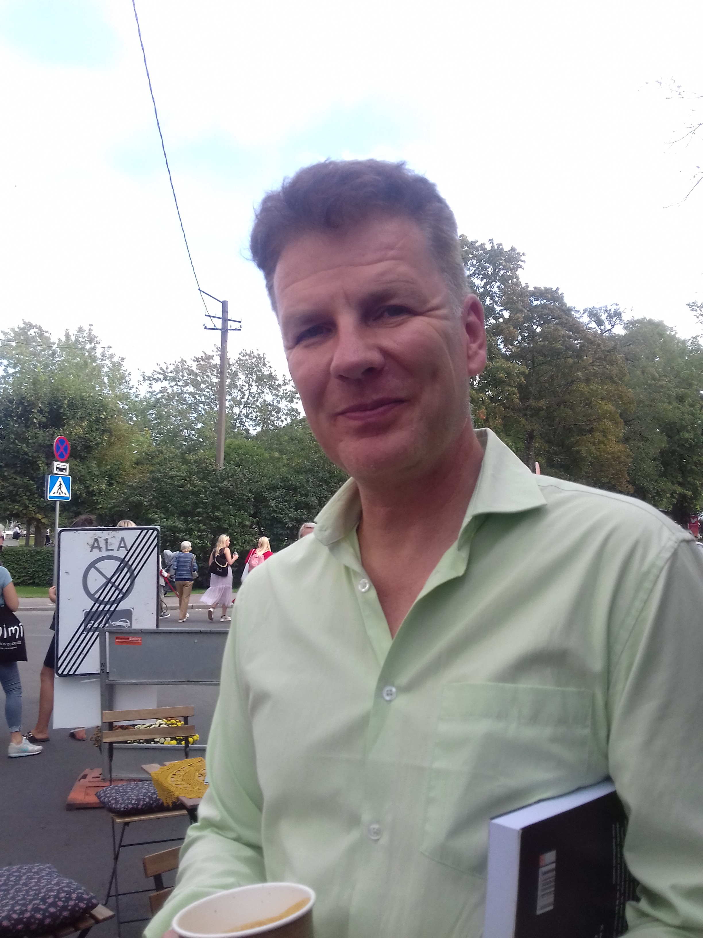 Allan Vainola kirjandustänaval